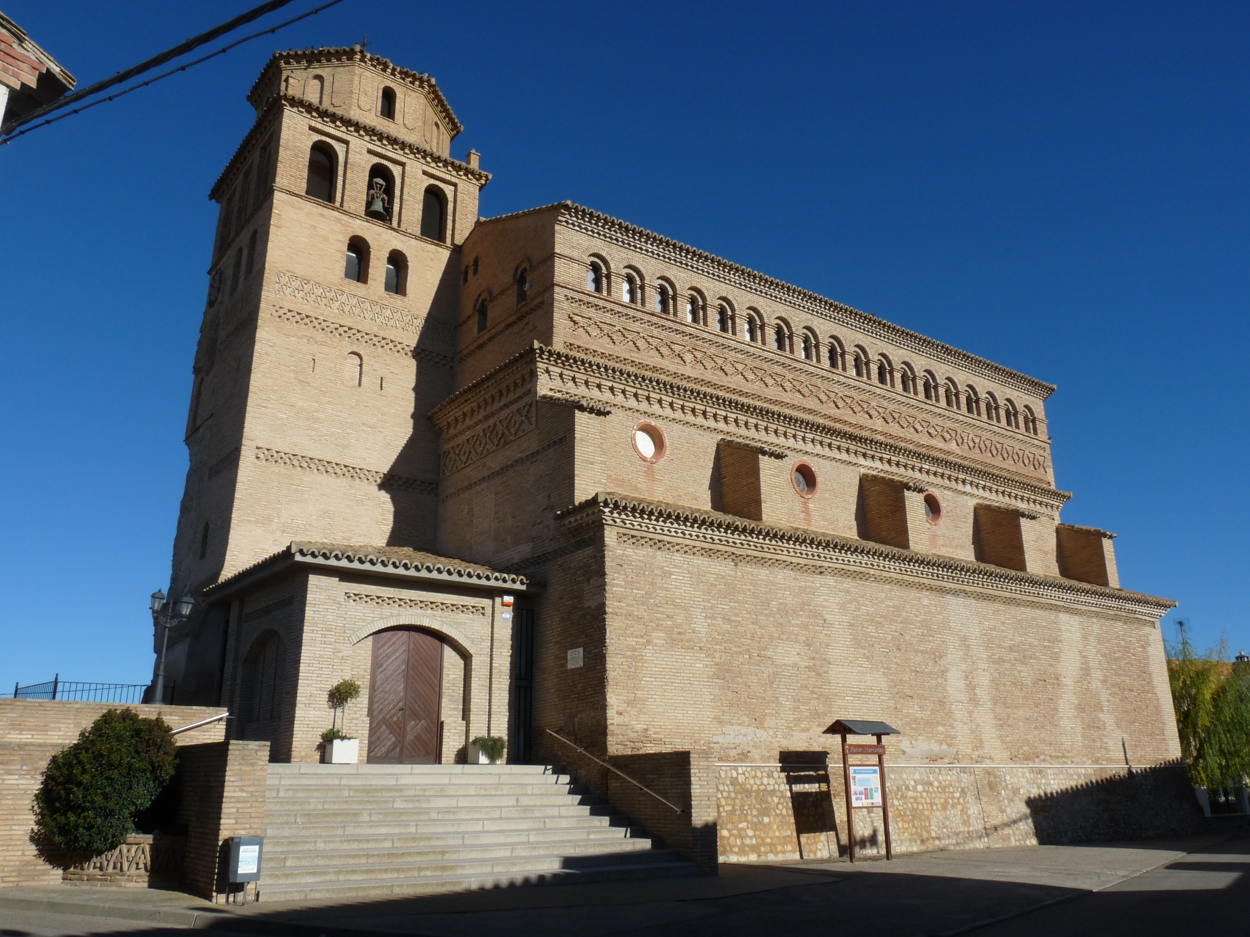 Perdiguera - Iglesia de Nuestra Señora de la Asunción (1496-s.XX) - Vista general